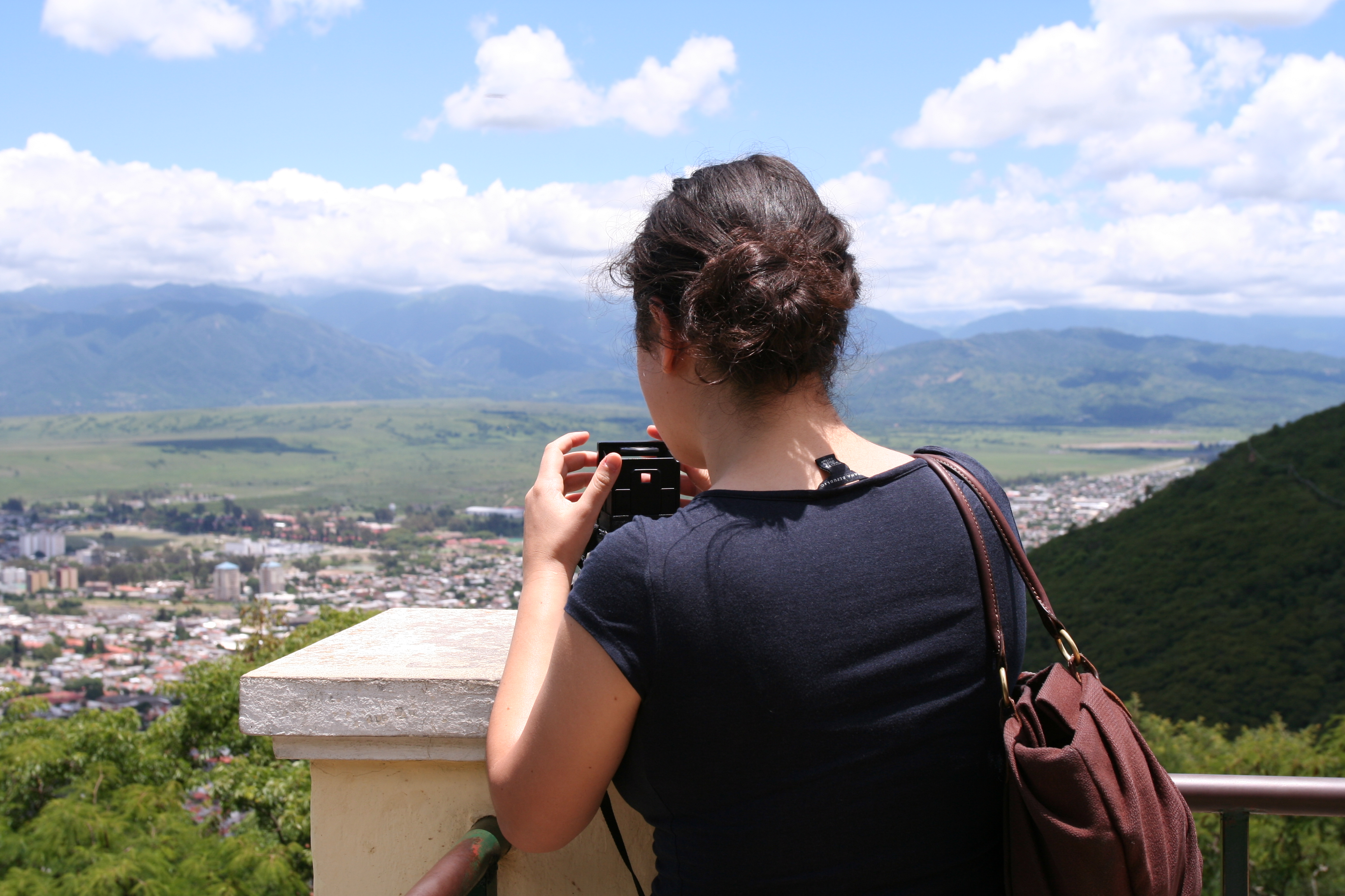 Vista desde el cerro San Bernardo